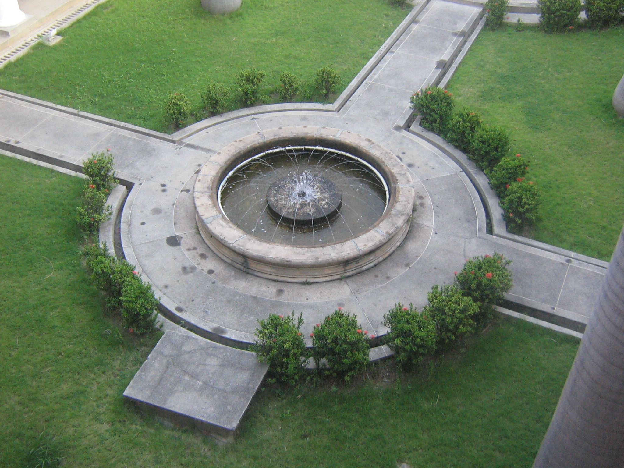 Gobernación de Norte de Santander